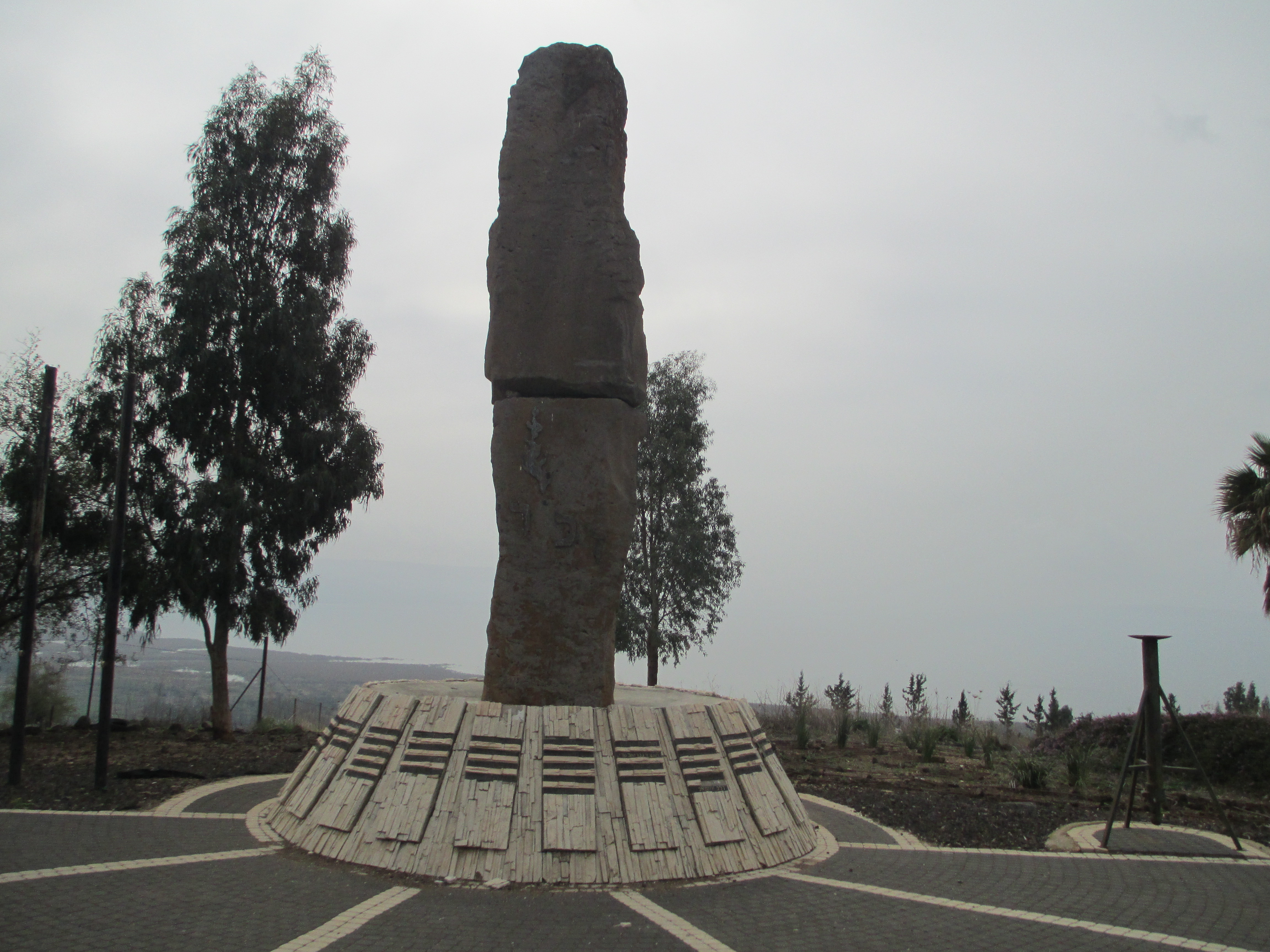 אנדרטת קרב תל מוטילה באלמגור